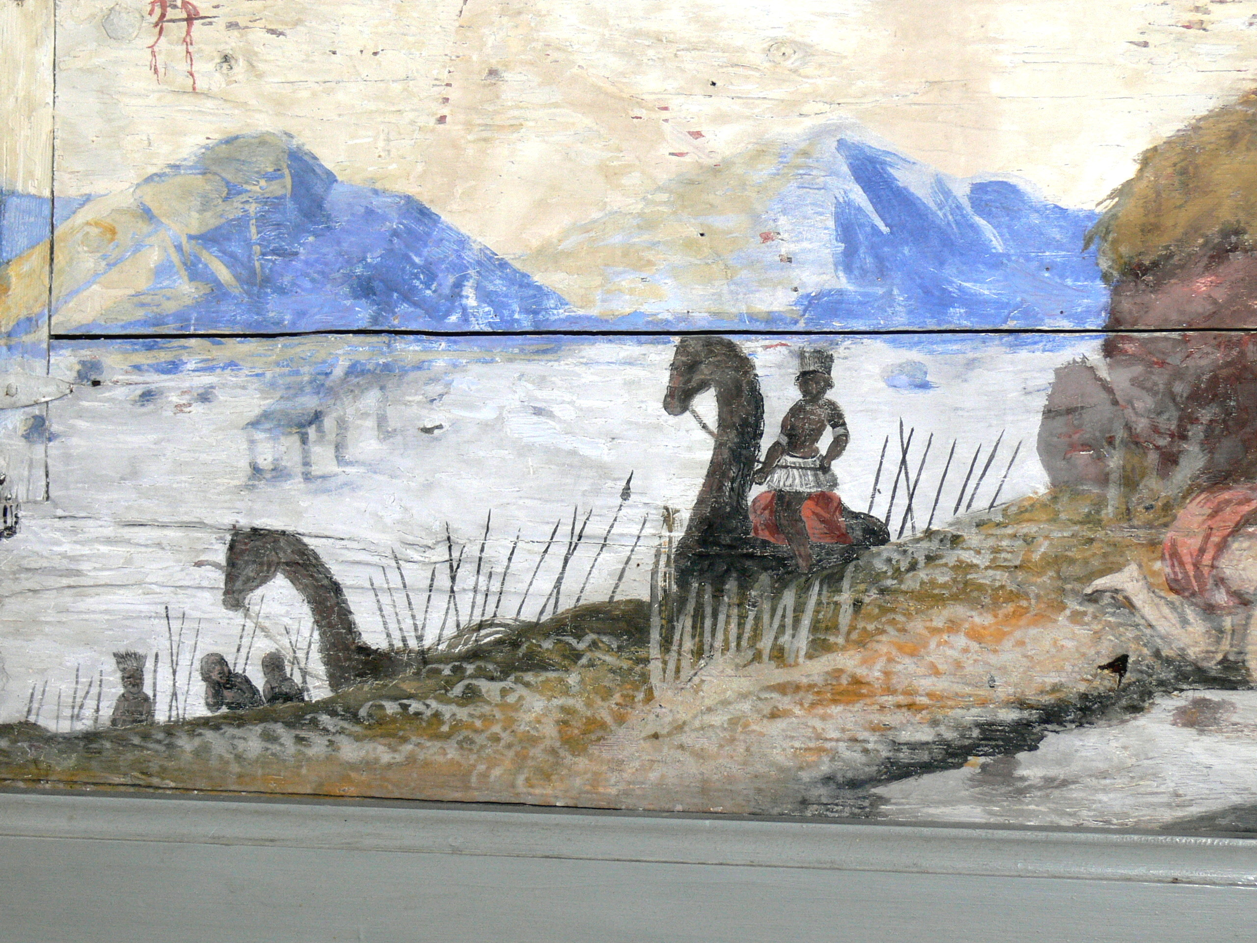 Bro Kyrka auf Gotland.Barockes Chorgestühl mit Bemalung: Mohr auf einem Kamel